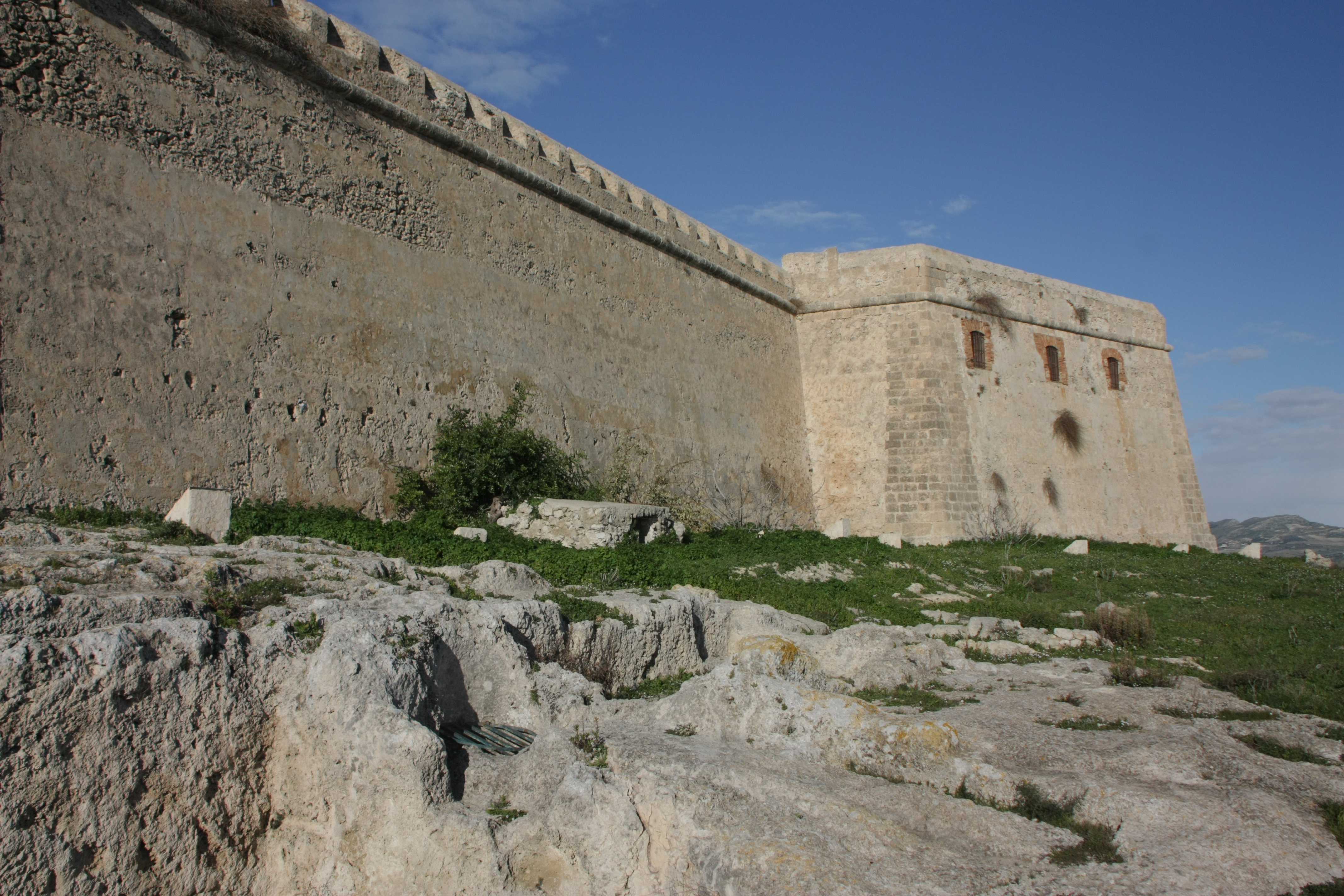 Castel Sant'Angelo (Licata)